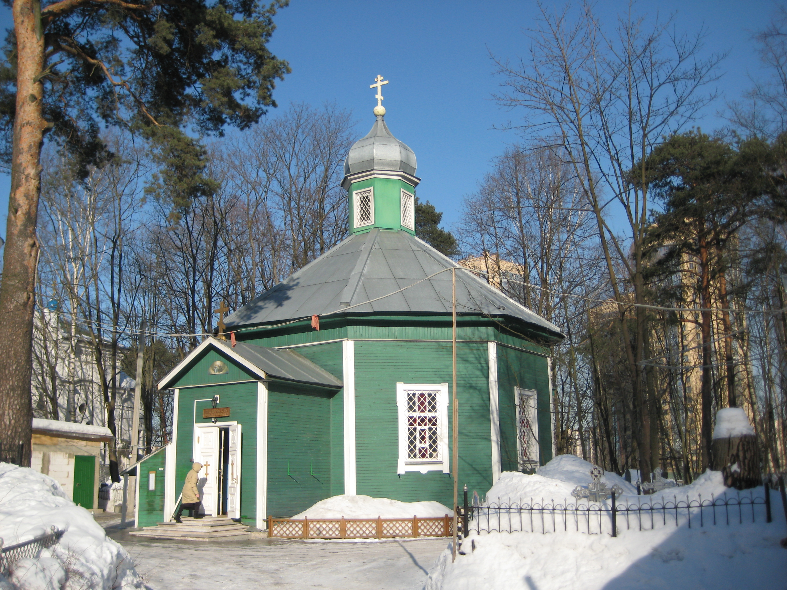 Санкт-Петербург. Шуваловское кладбище. Церковь Александра Невского.